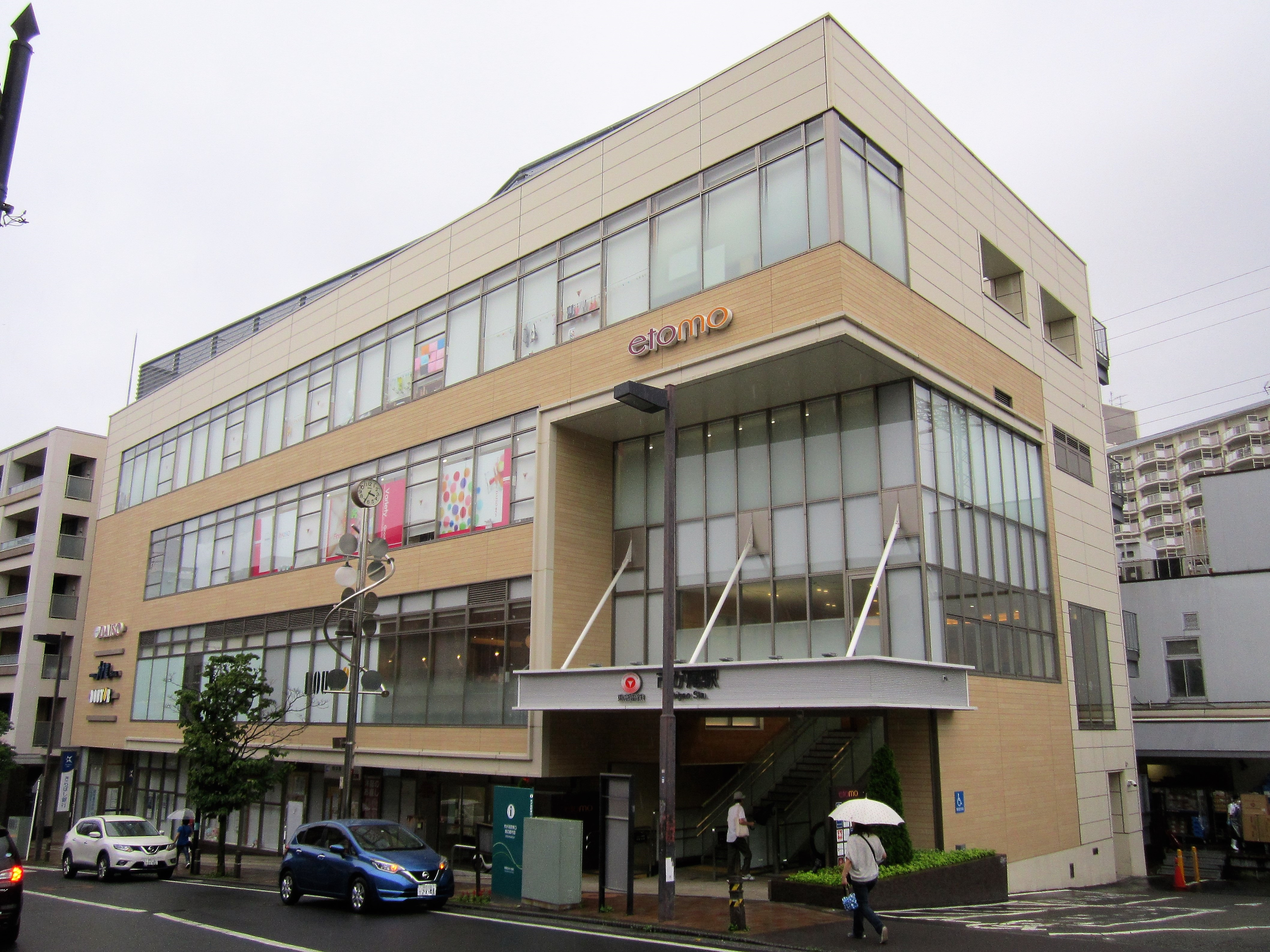 市が尾駅東口 駅ビル「エトモ」